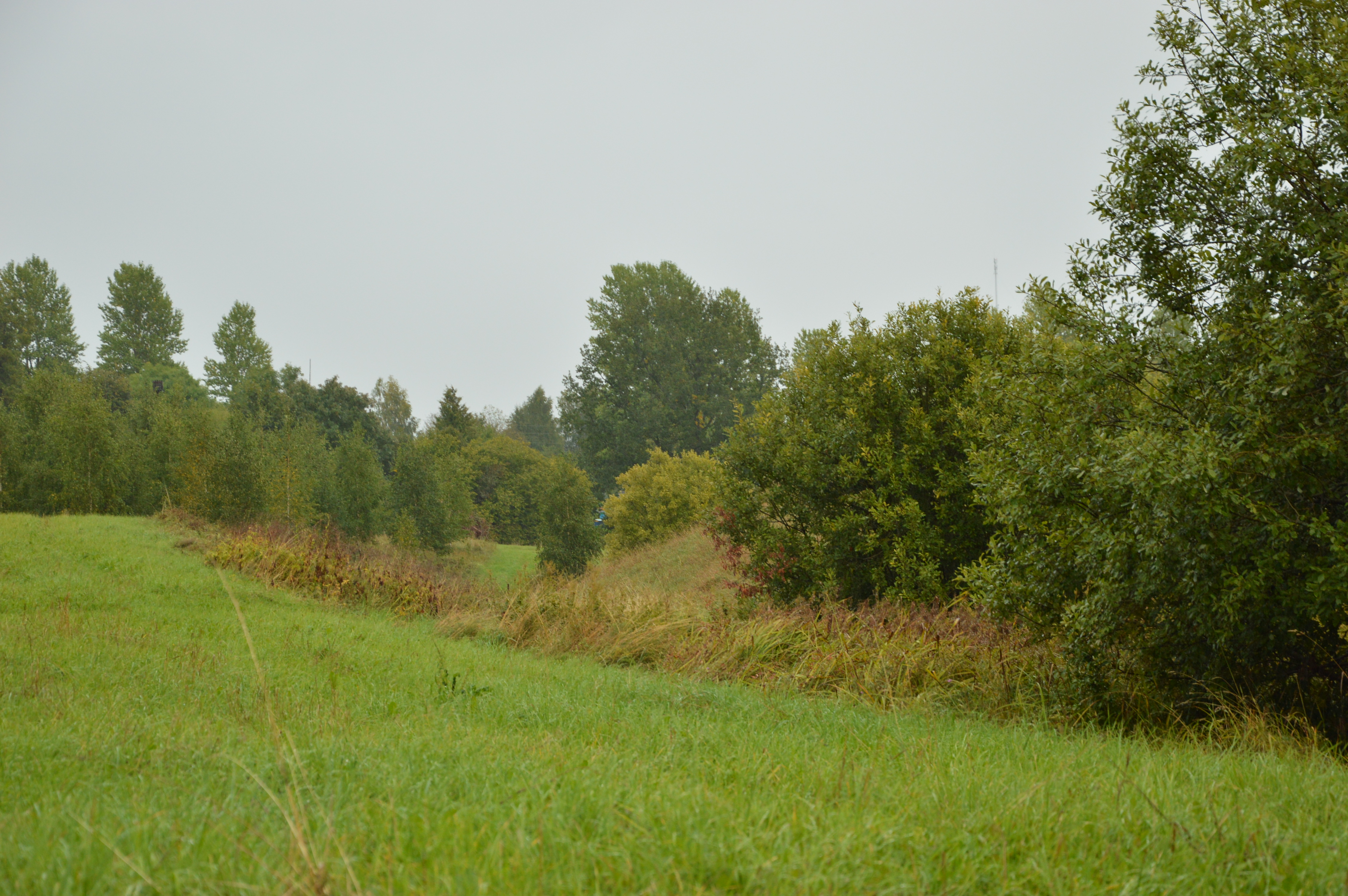 Vana-Pebalgi piiskopilinnus. Kirikupoolne kraav.